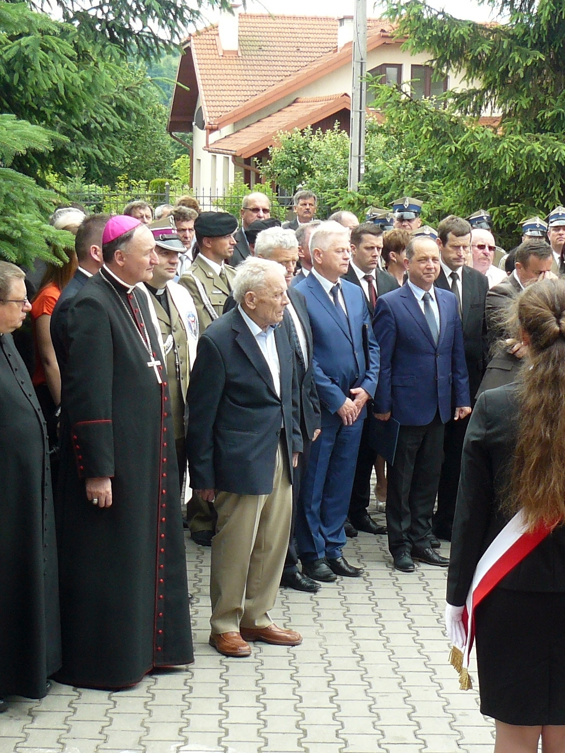 Aleksander Tarnawski w Stróżach na uroczystości odsłonięcia pomnika upamiętniającego mjr Romana Proszka oraz rtm Mariana Jureckiego w 2015r.